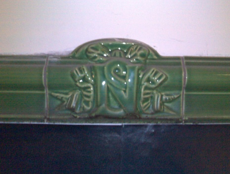 Carrelage Nord-Sud sur le métro parisien